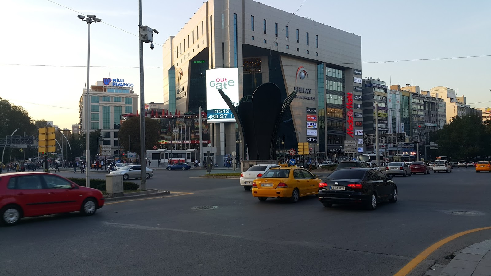 Kızılay AVM, Ankara, 2015.